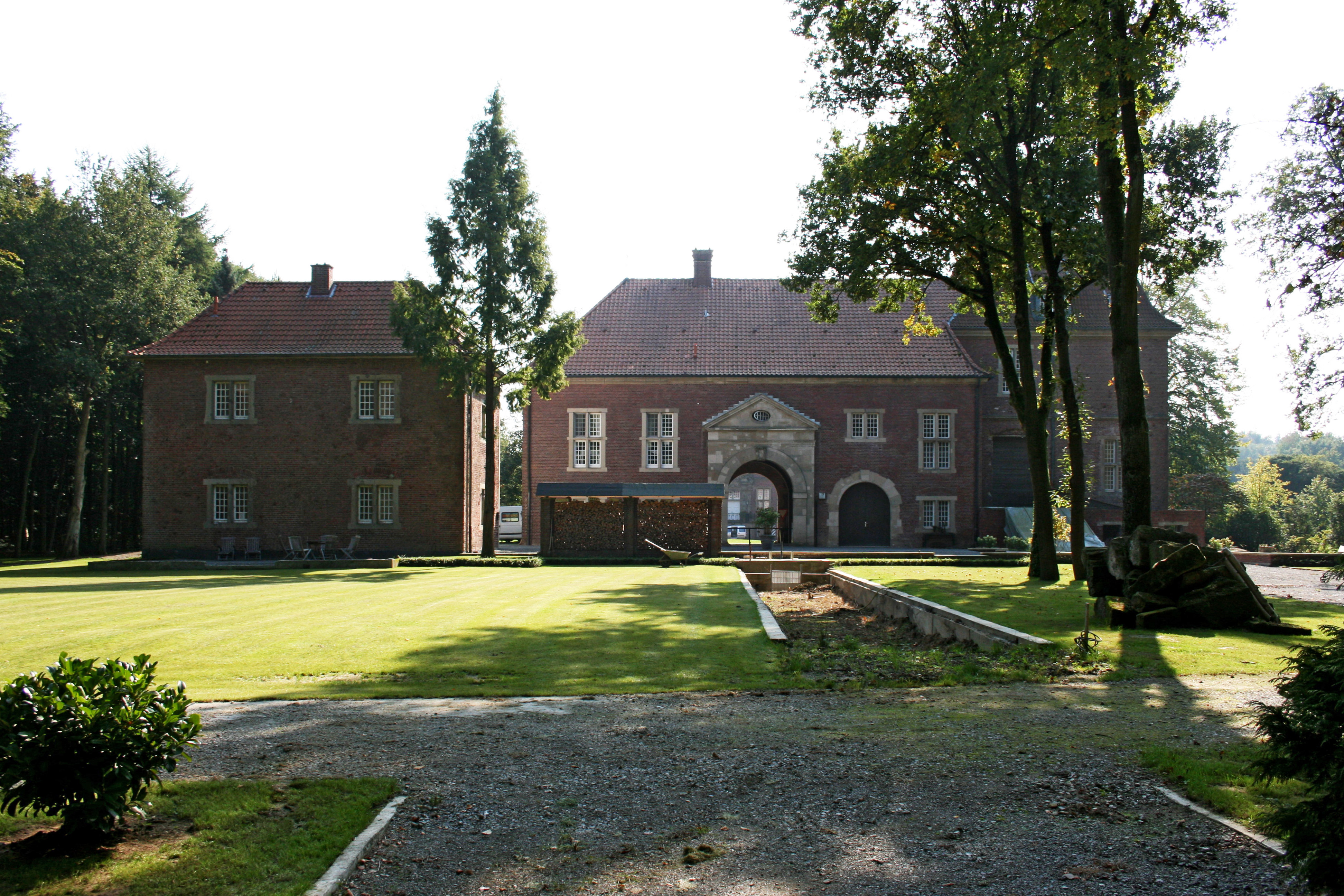 Schloss Kalbeck in Weeze